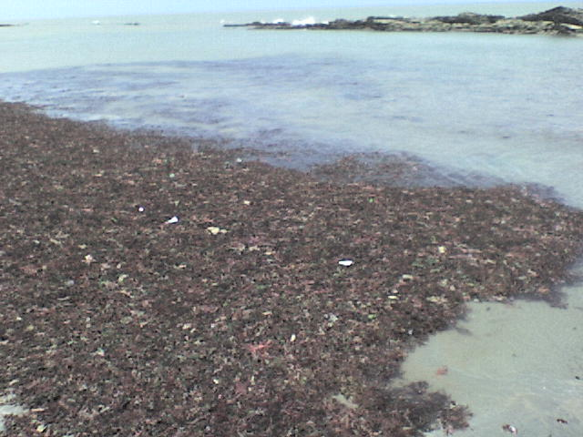 Algas marinhas sobre a areia da praia de Perobas, no Rio Grande do Norte, Brasil